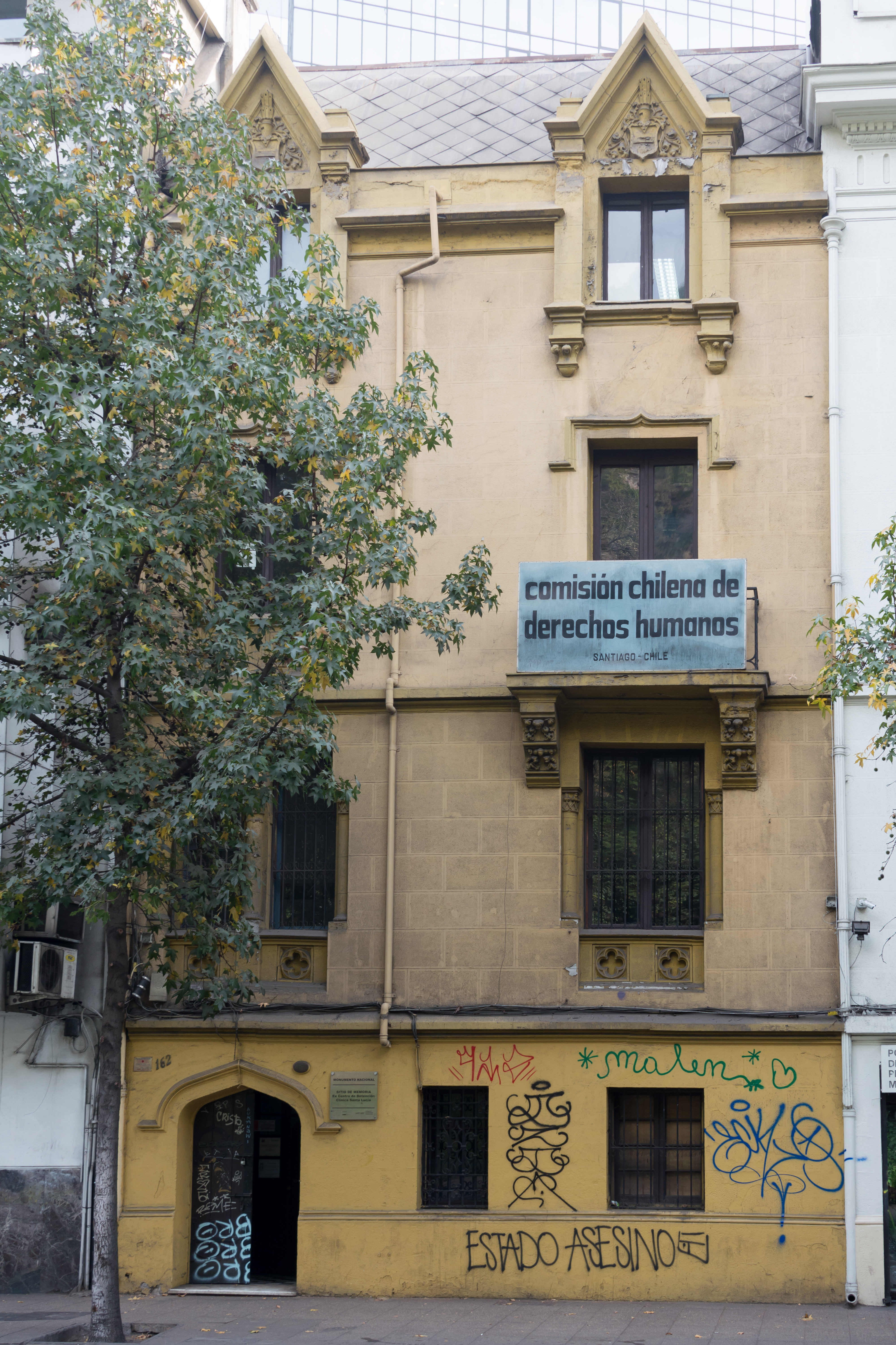 Clínica Santa Lucía, Santiago, Chile.